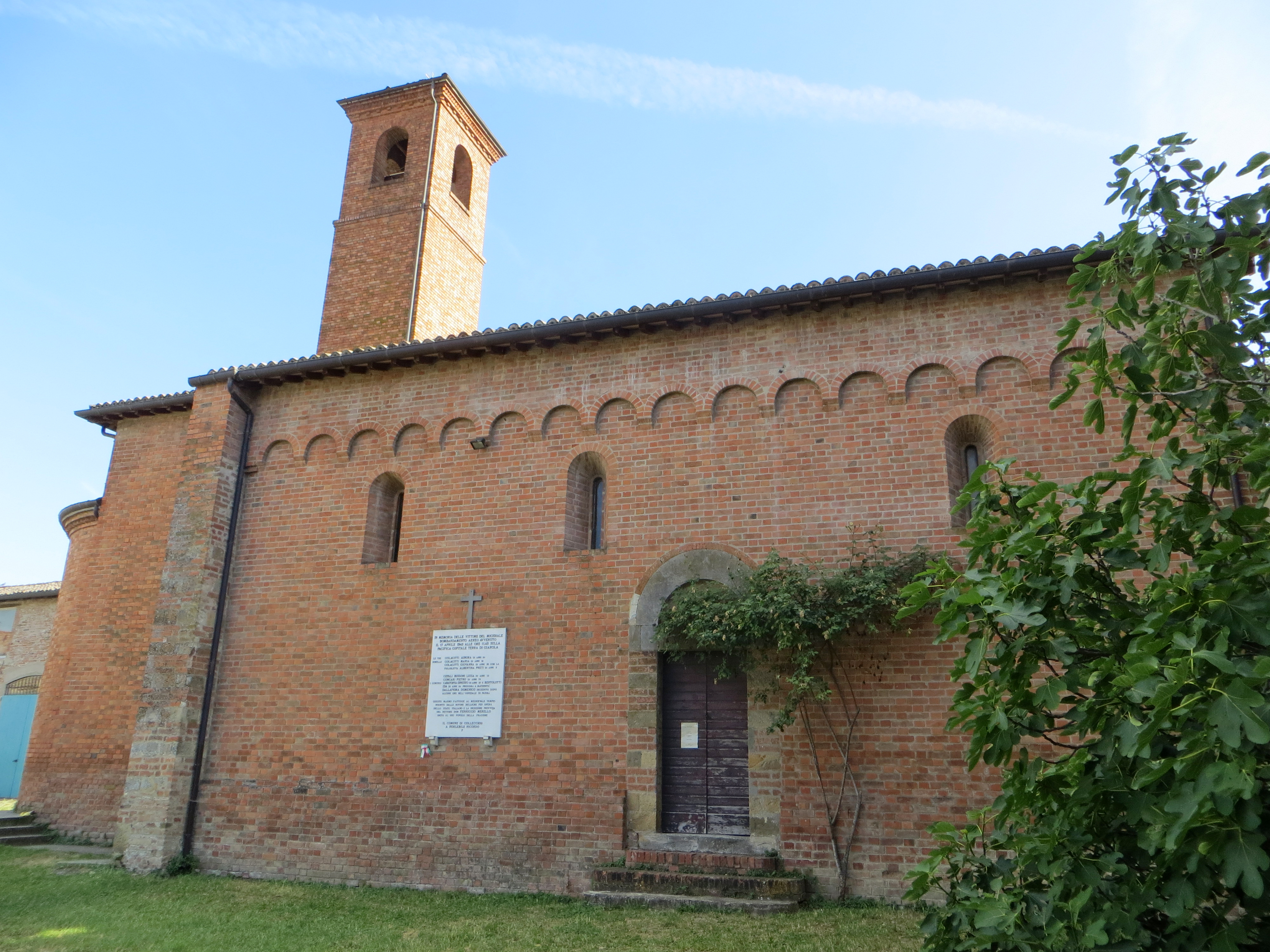 Chiesa di San Nicomede (Giarola, Collecchio) - lato nord